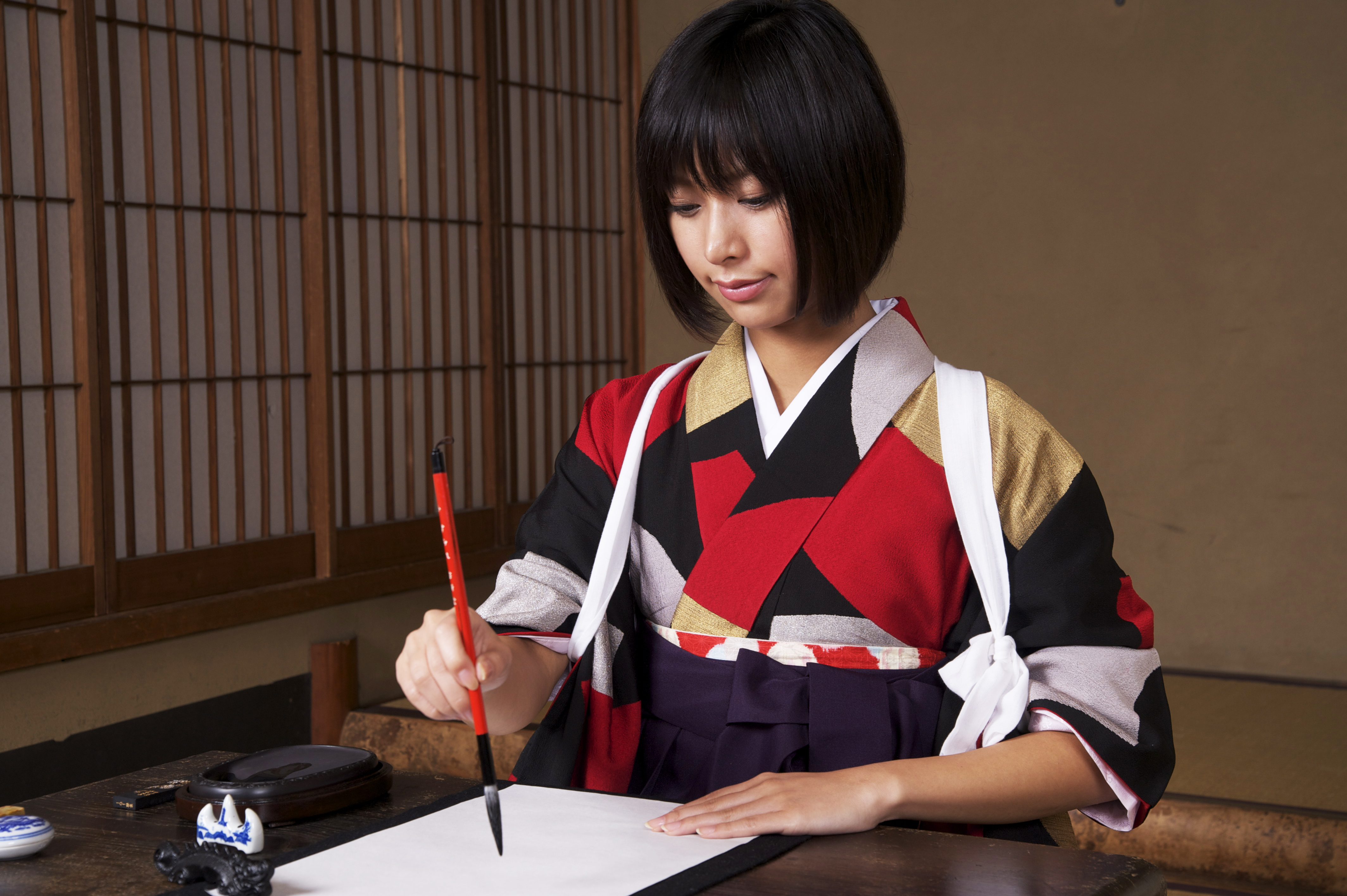 りょうふうか